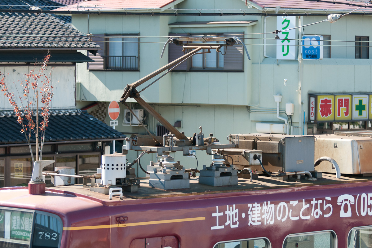 豊橋鉄道782号のパンタグラフ。